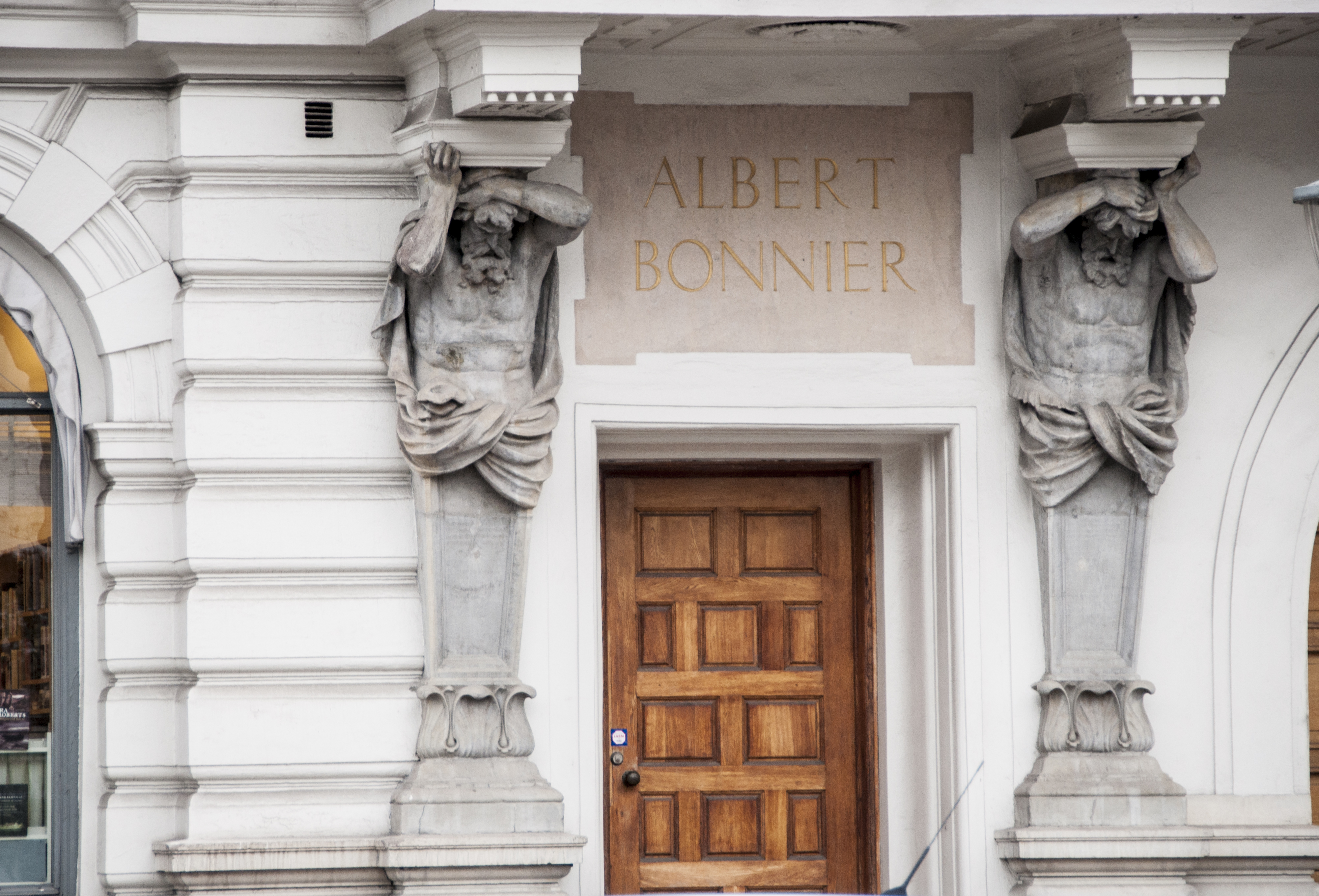 Bonnierhuset Sveavägen 54-58, Nybyggnadsår 1882 - 1884, August Reinhold (Byggherre) Fredrik Olaus Lindström (Arkitekt)